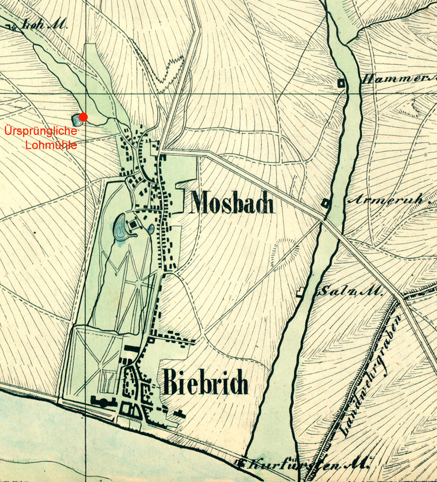 Karte von Biebrich und Mosbach um 1819; Ausschnitt aus der unter Quelle genannten Karte; mit Markierung der ursprünglichen Lohmühle, der Keimzelle der Chemischen Werke Albert. Sie befand sich im Bereich der heutigen Hubertusstraße zwischen Pestalozzischule und Herz-Jesu-Kirche. Die heutige Lohmühle liegt ca. 1 km nördlich davon.